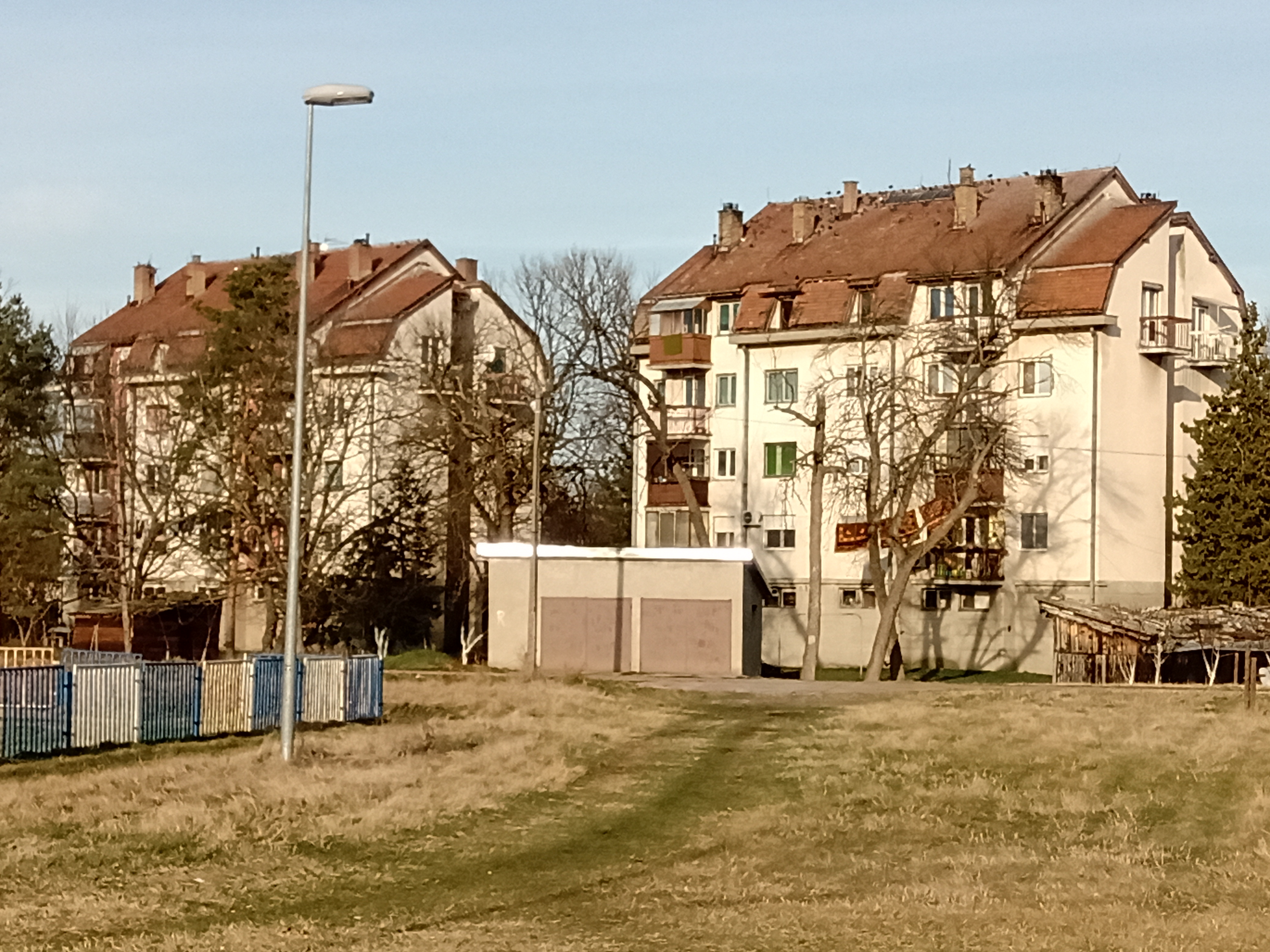 Насеље Глогоњски рит